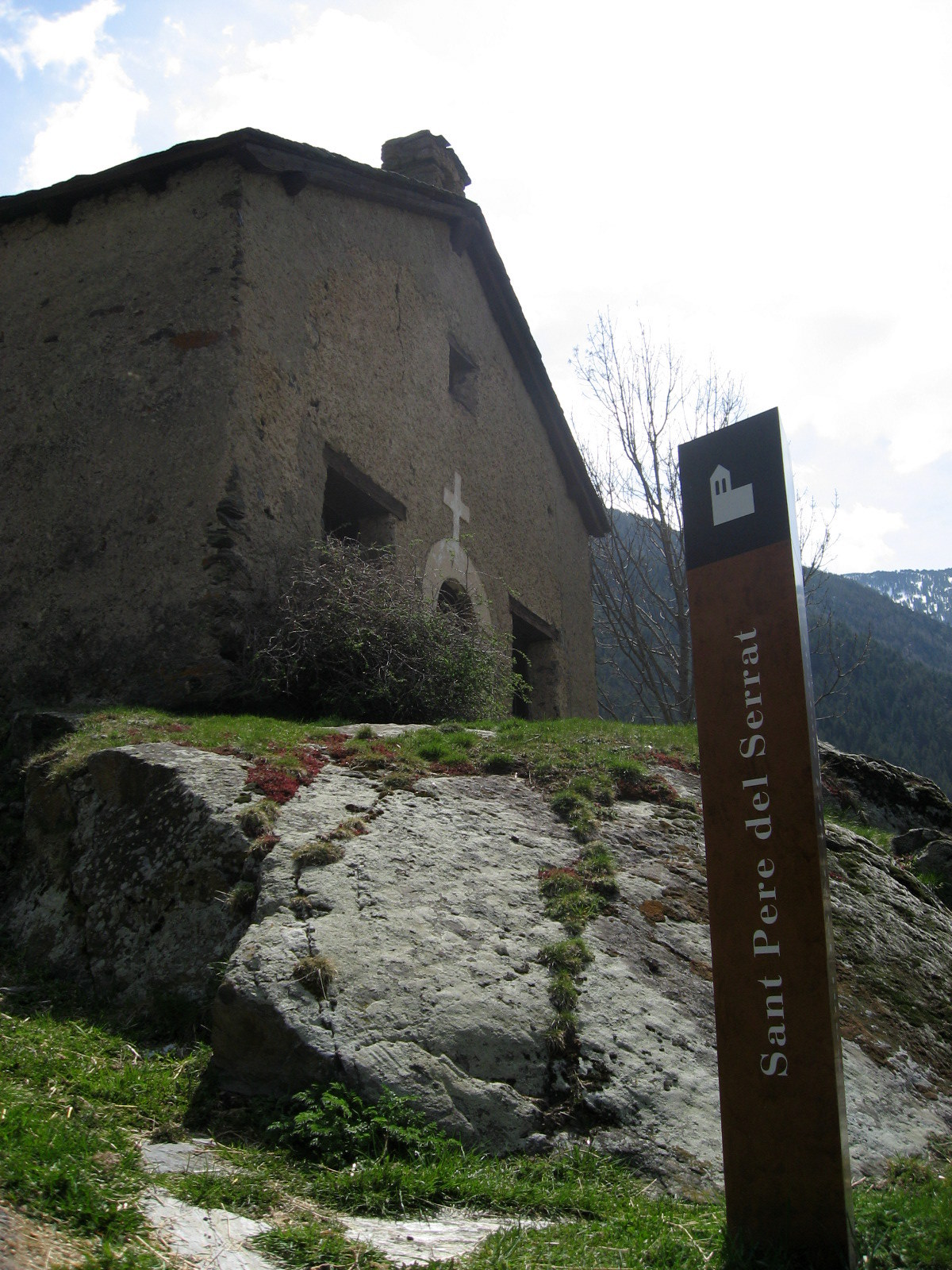 Church: Sant Pere del Serrat